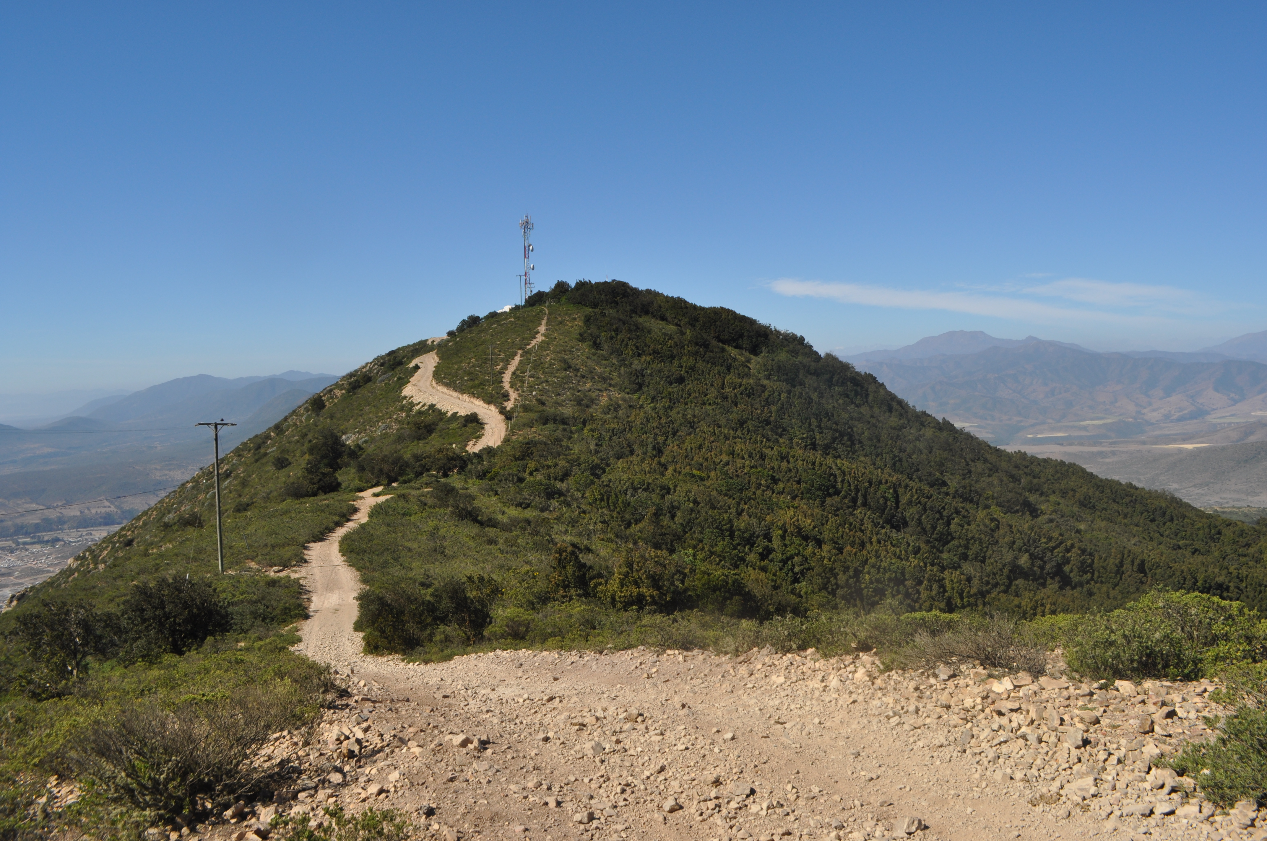 Una de las dos cumbres en la cima del Cerro Santa Inés. Hacia el sureste (a la derecha en la foto) se extiende el bosque relicto.